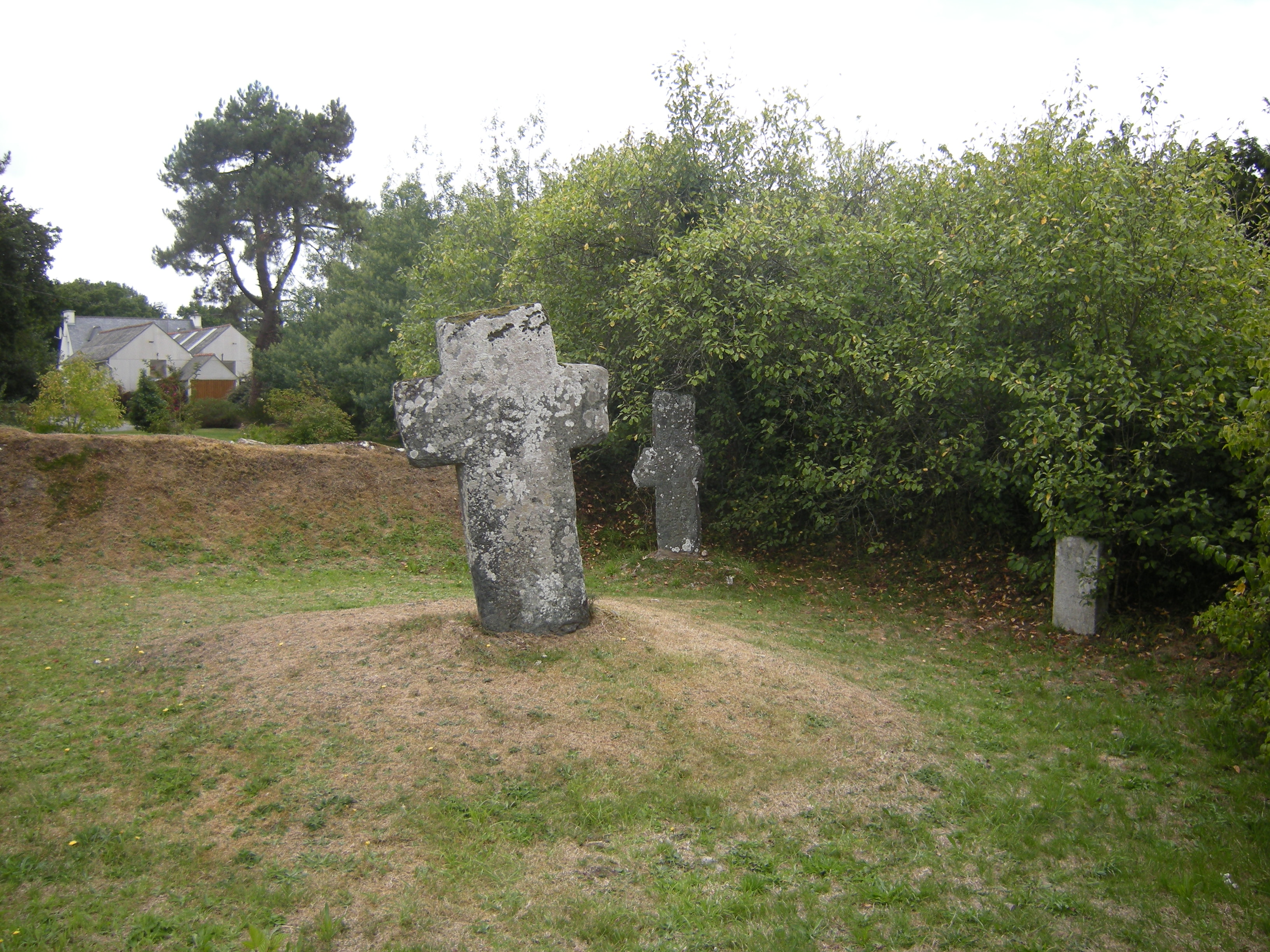 Les deux croix médiévales de Plourivo, rue Alain Barbetorte, Plourivo, France